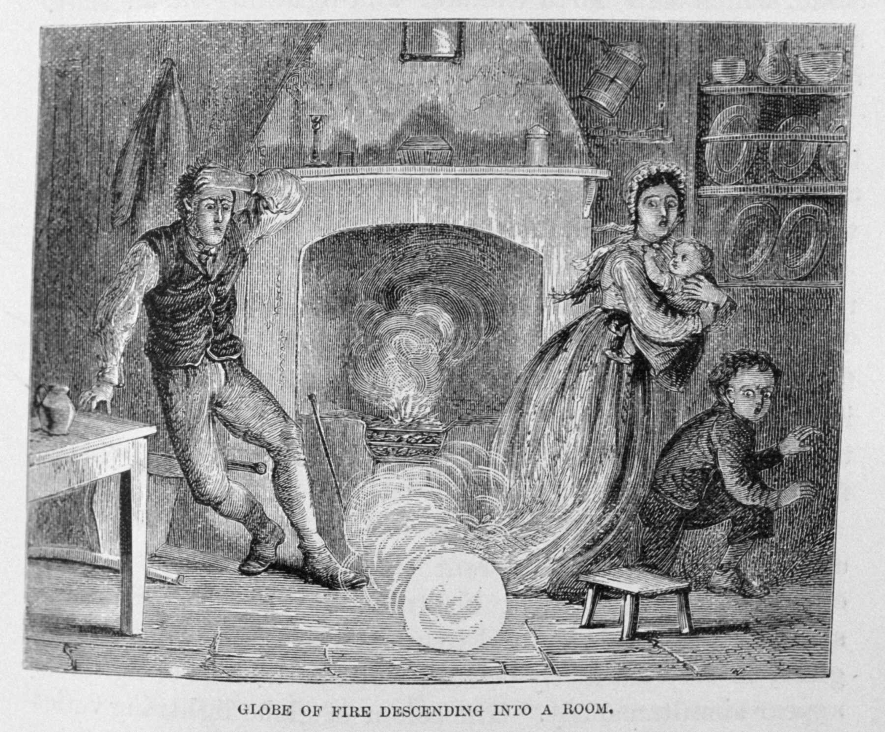 Ball Lightning - "Globe of Fire Descending into a Room" in "The Aerial World," by Dr. G. Hartwig, London, 1886. P. 267. Library Call Number QC863.4 H33 1886. Image ID: libr0524, Treasures of the NOAA Library Collection